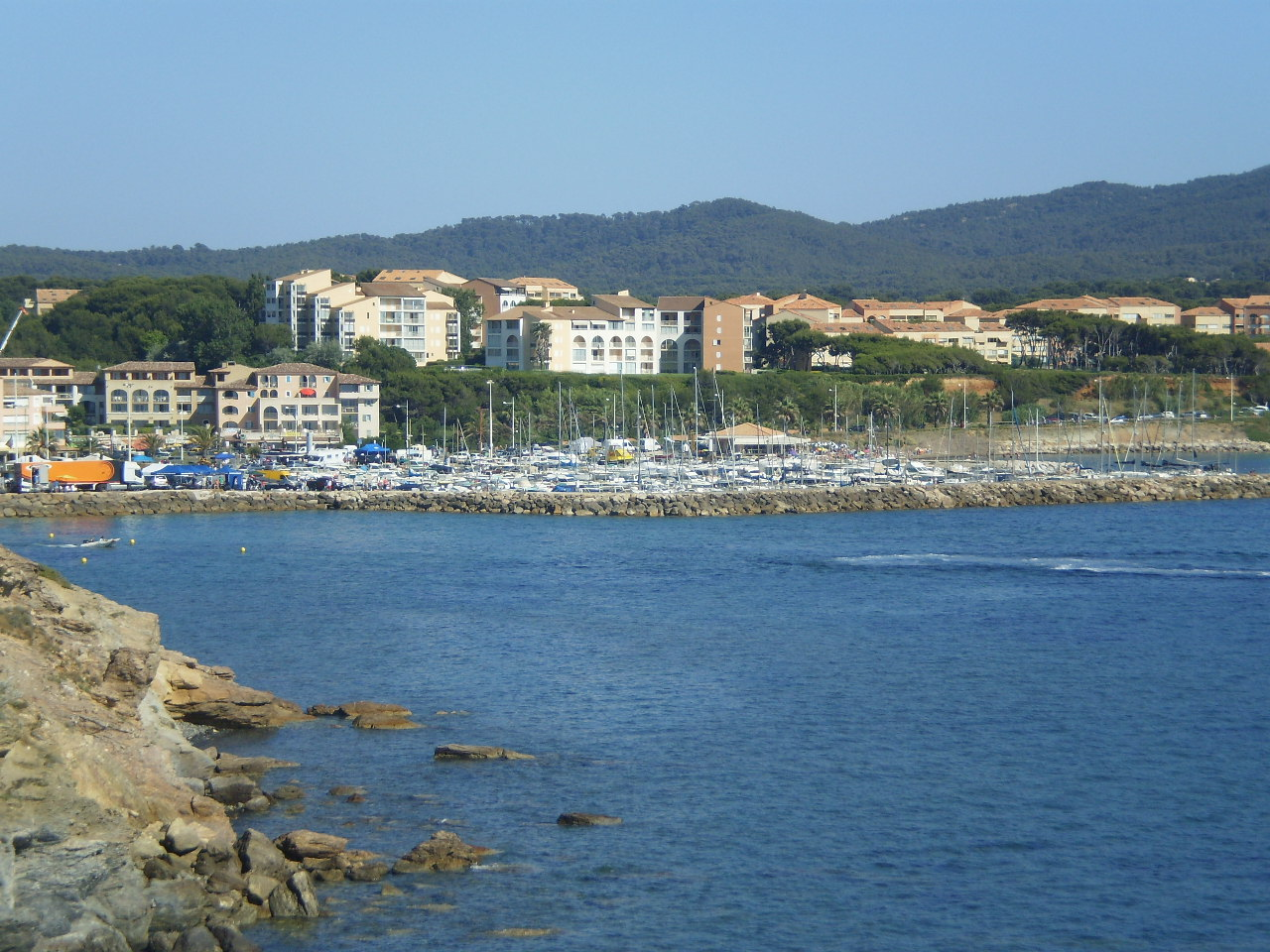 Le port de la Coudoulière et les résidences